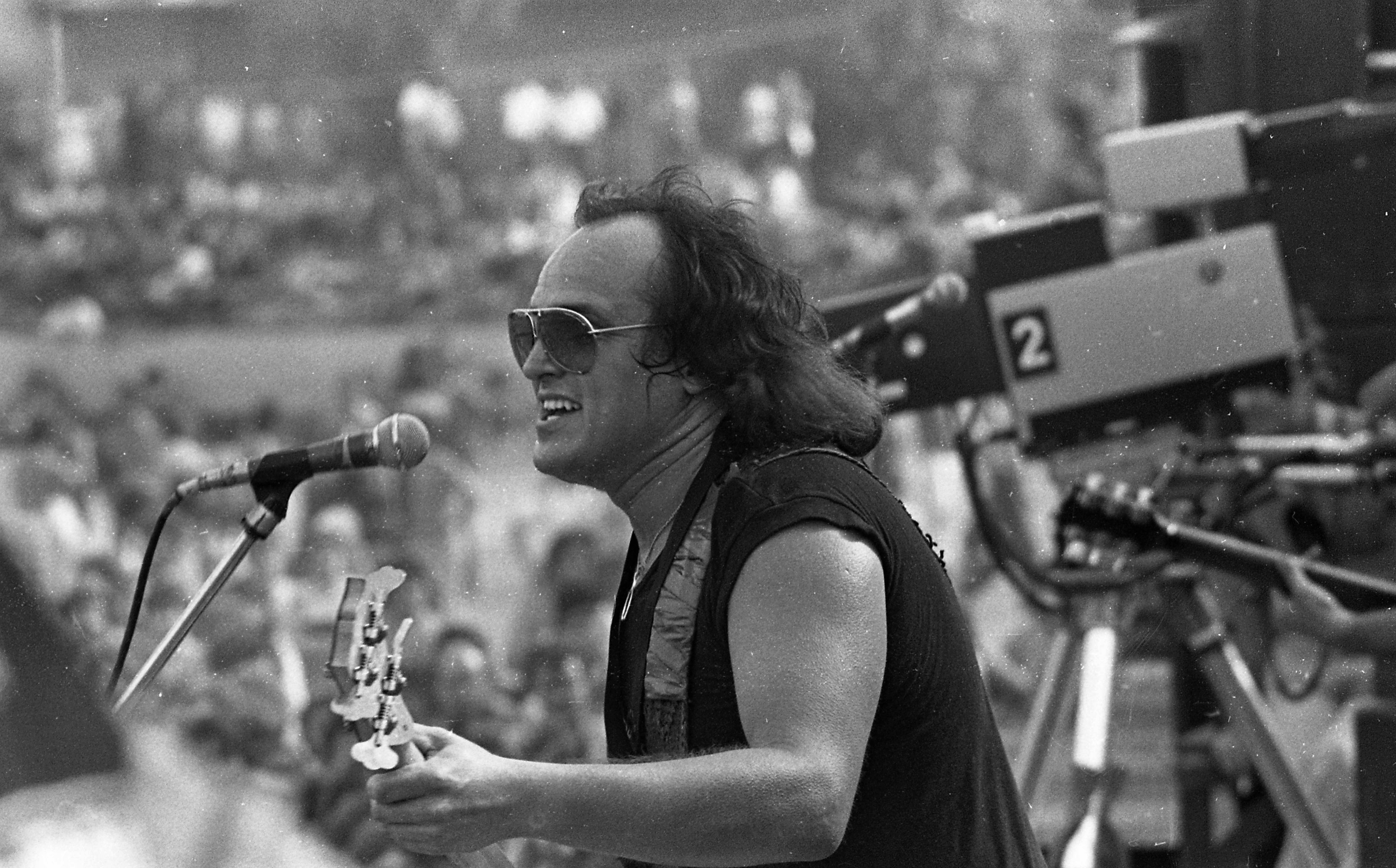 Frenreisz Károly (Budapest, 1946. november 8. –) magyar rockzenész, zeneszerző.